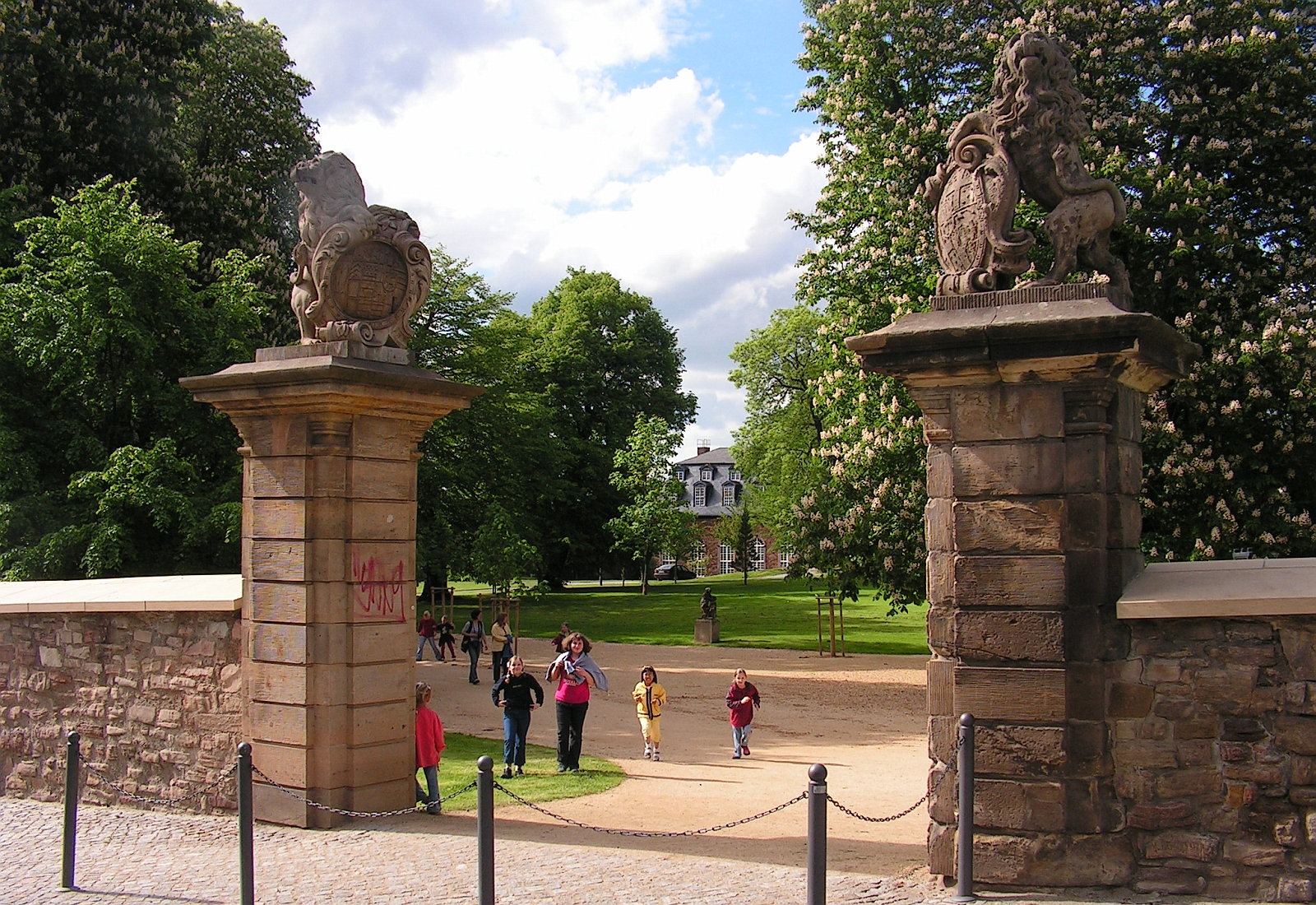 Wernigerode Löwentor Lustgarten Orangerie Bibliothek Parkanlage Foto 2005 Wolfgang Pehlemann Wiesbaden PICT0036